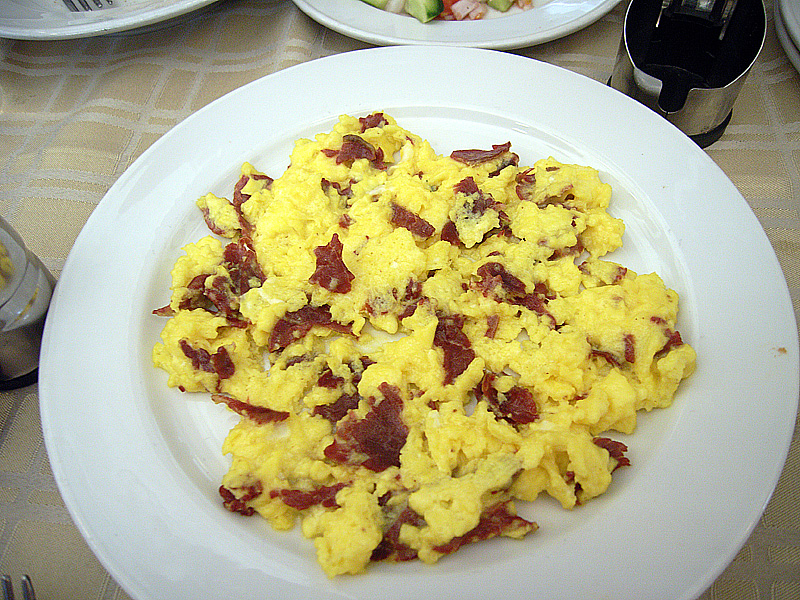 Rührei mit Bastirma